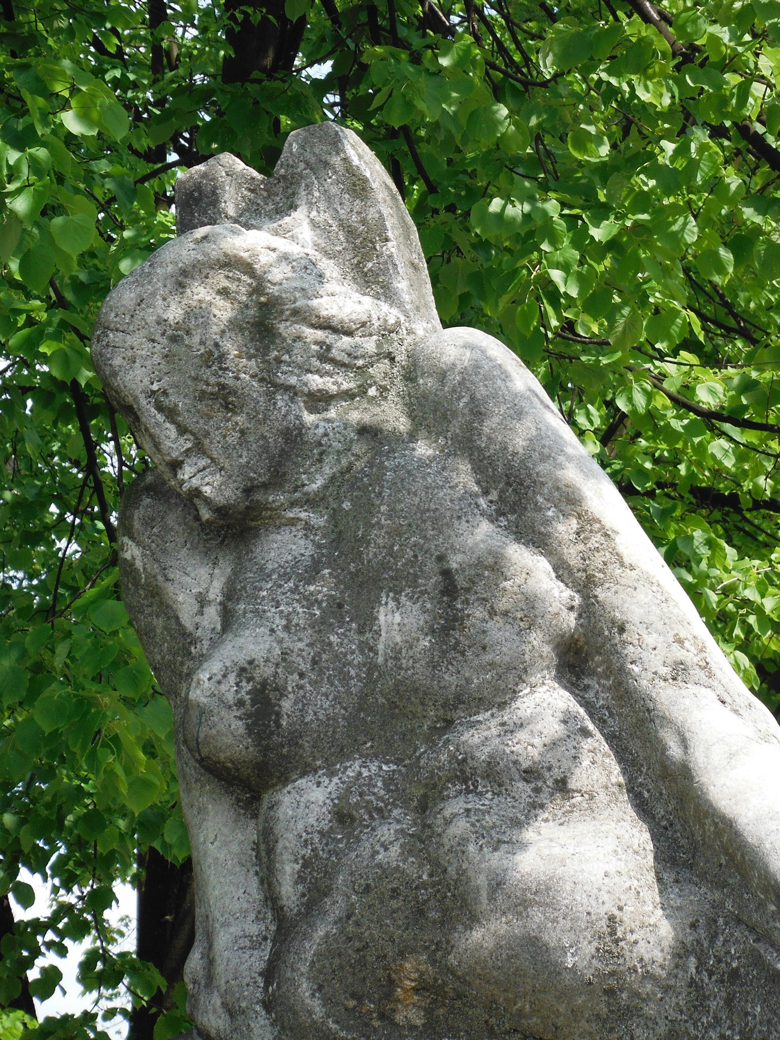 "Majestat Wszechżycia" autorstwa Ryszarda Wojciechowskiego - jedna z rzeźb plenerowych przy ul. Międzynarodowej w Warszawie.